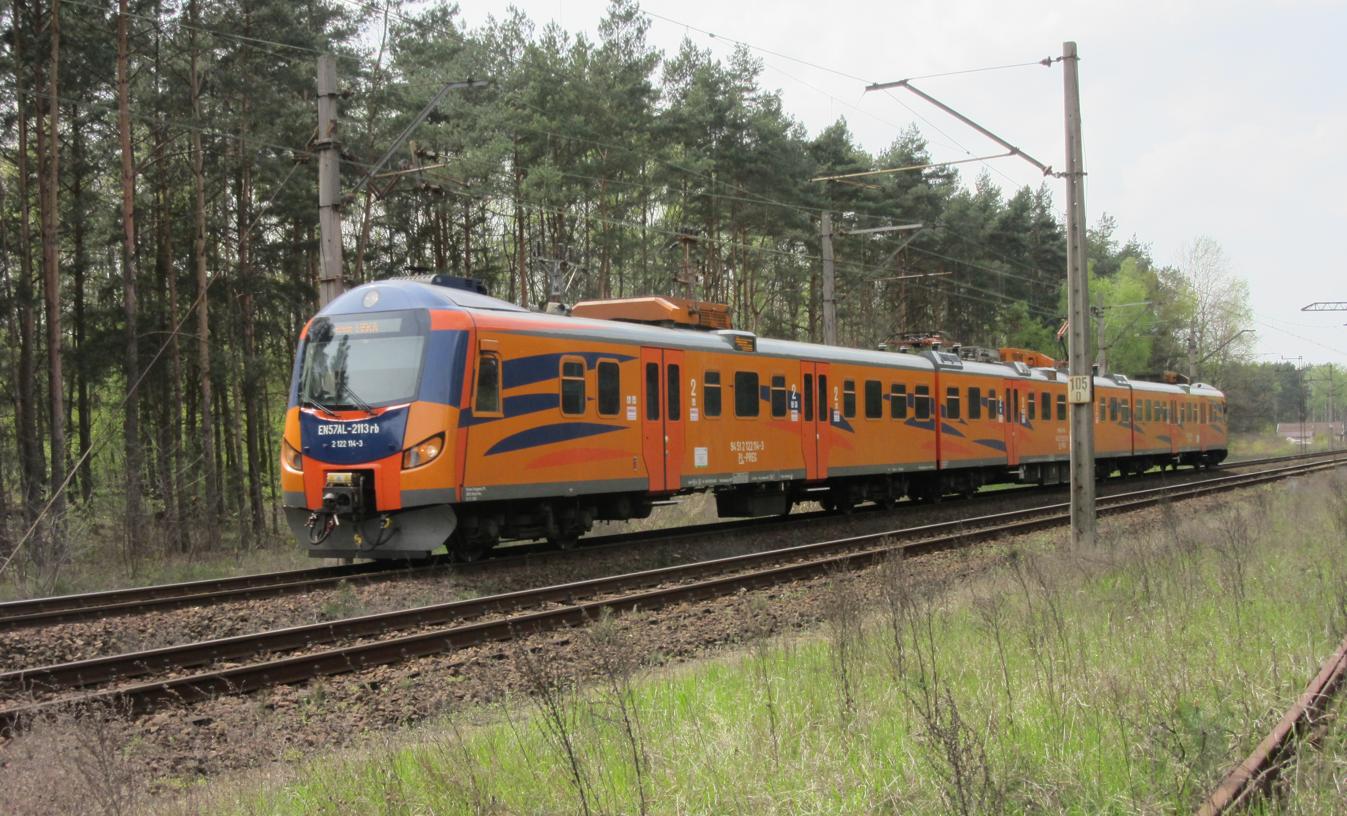 EN57AL-2113 zbliżający się do przystanku kolejowego Kalisz Winiary